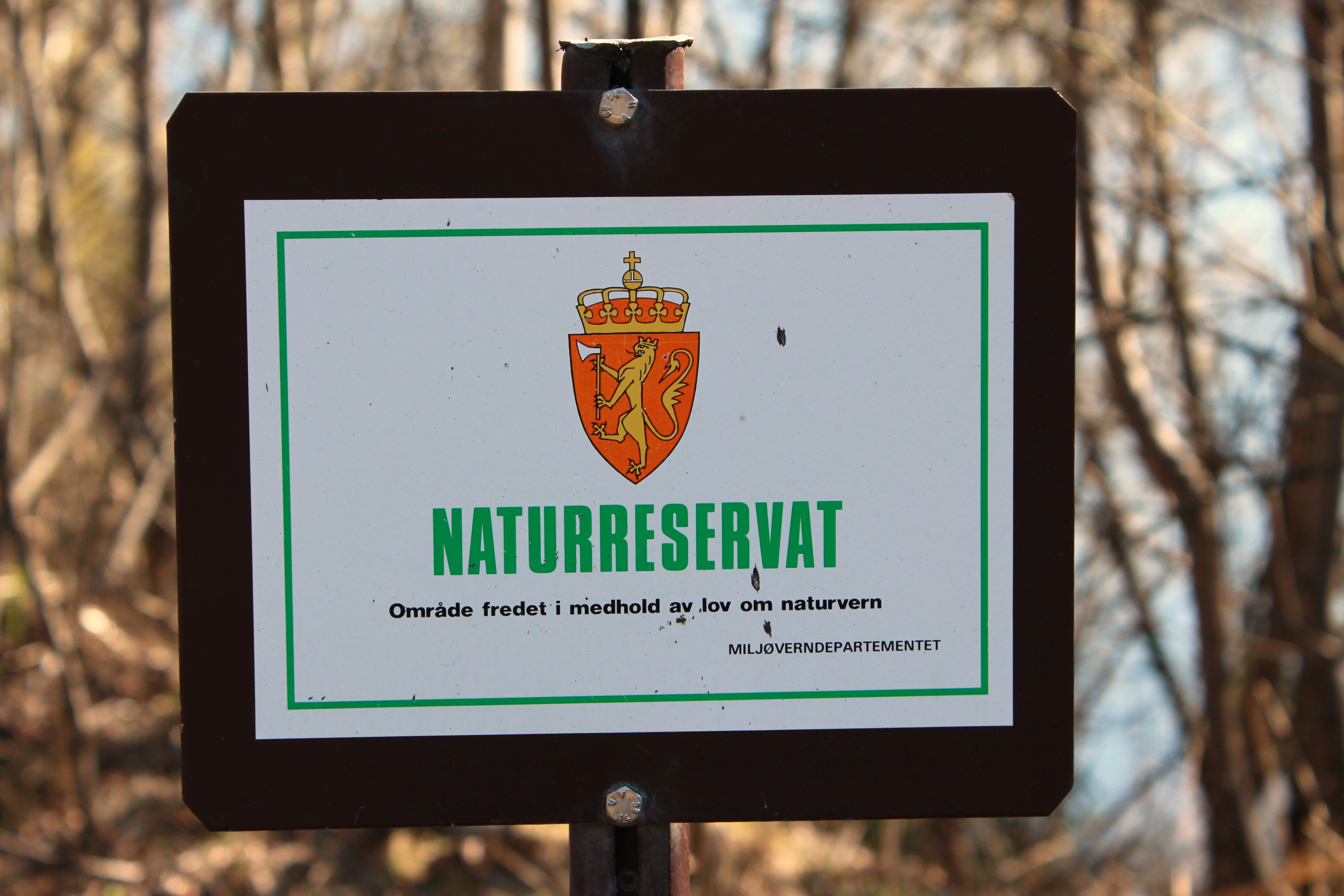 Naturreservat skilt